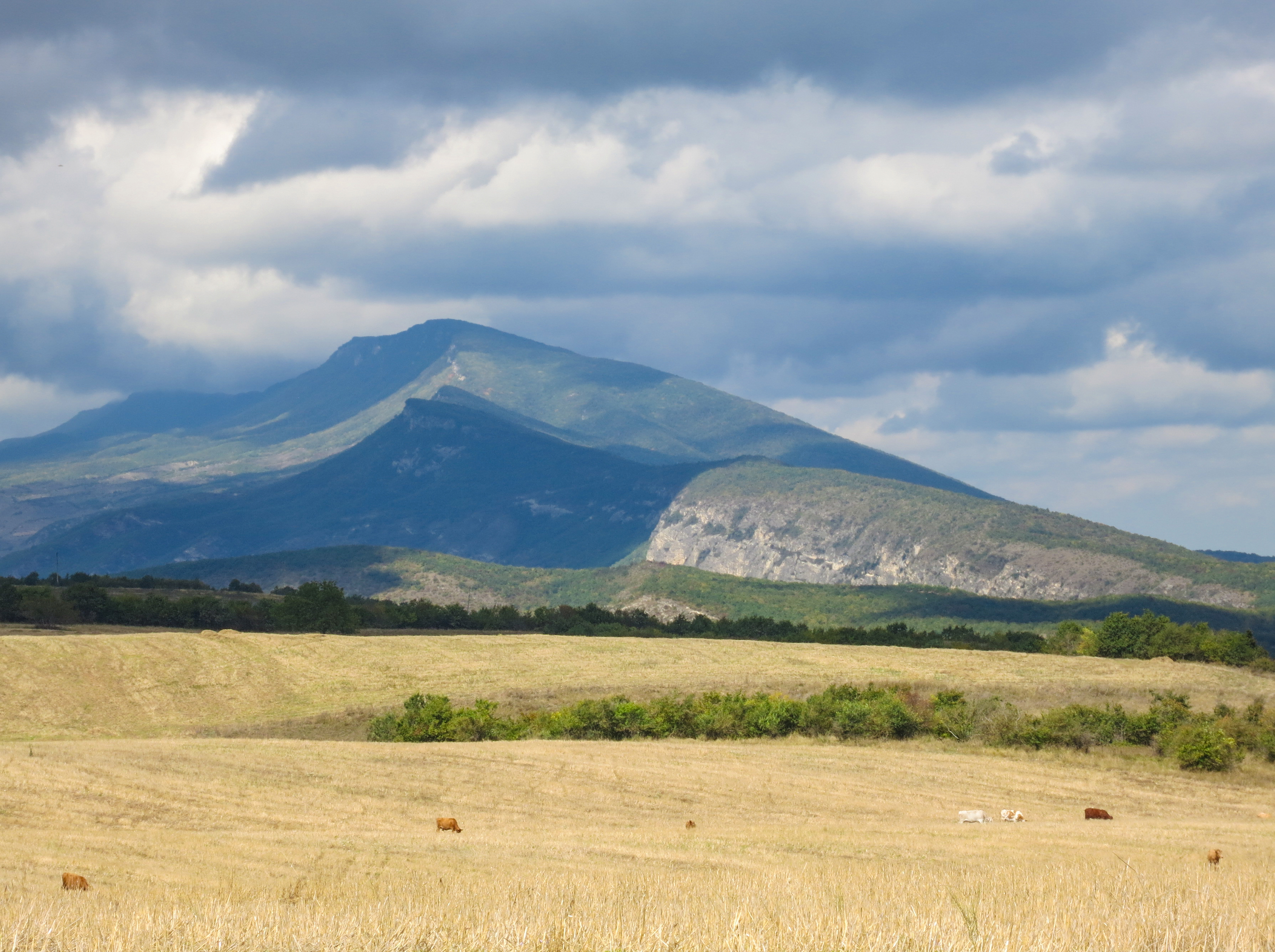 Южный Дагестан